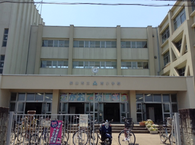 写真が存在しなかったのでアップしました